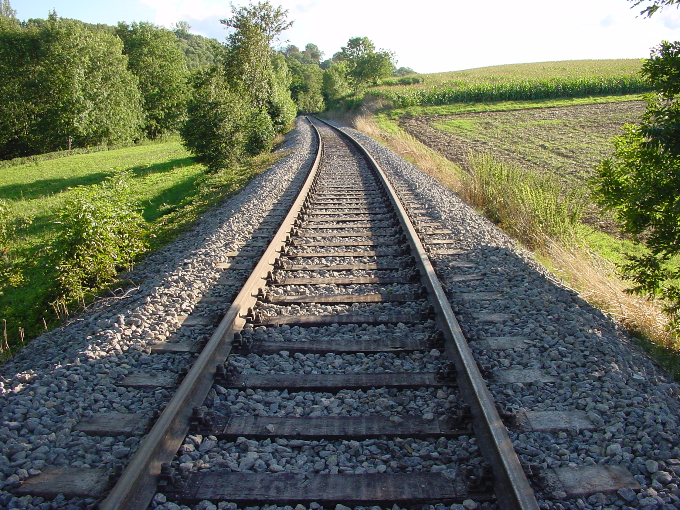 Richtung Hemmingen